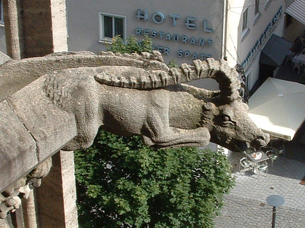 Wasserspeier am Ulmer Münster